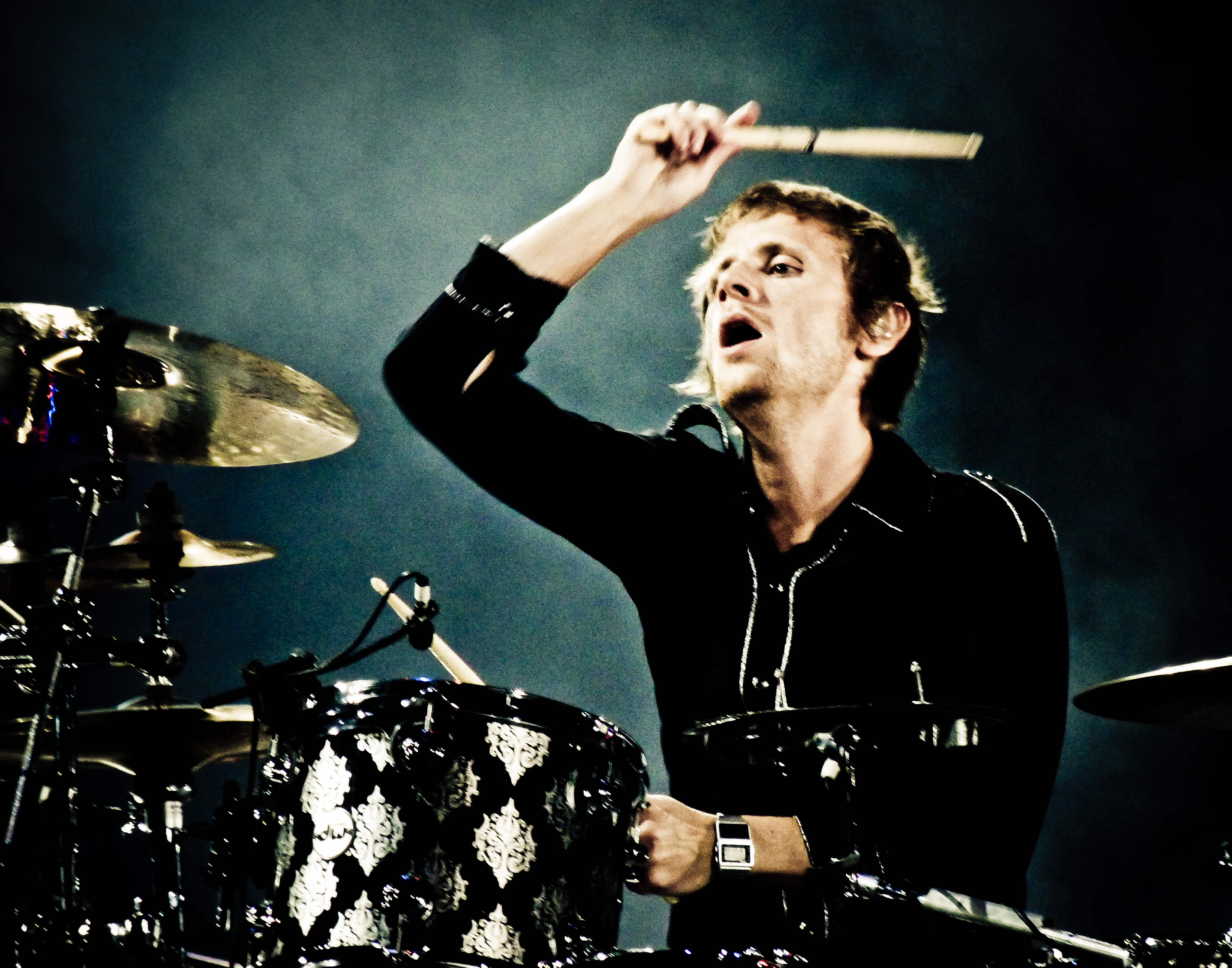 Dominic Howard tijdens een optreden in het Estadio Ciudad de La Plata op 11 maart 2011.